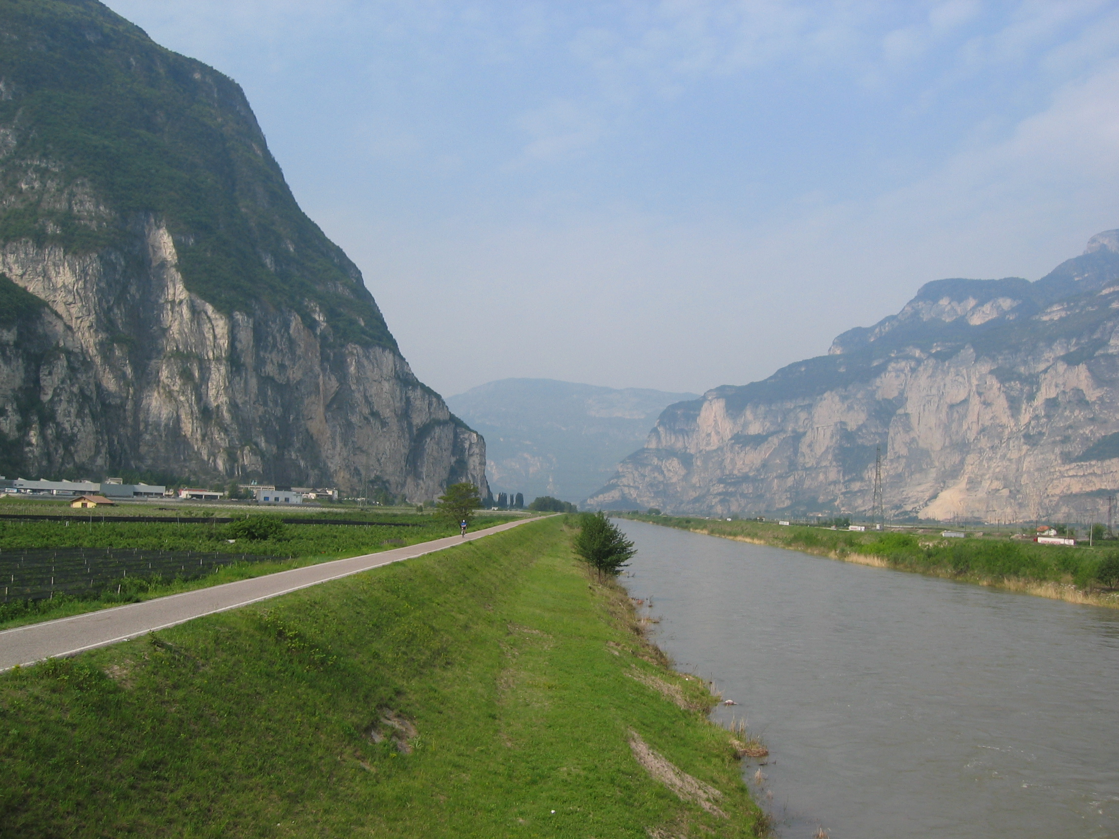 Saluner Klause 09.05.2011